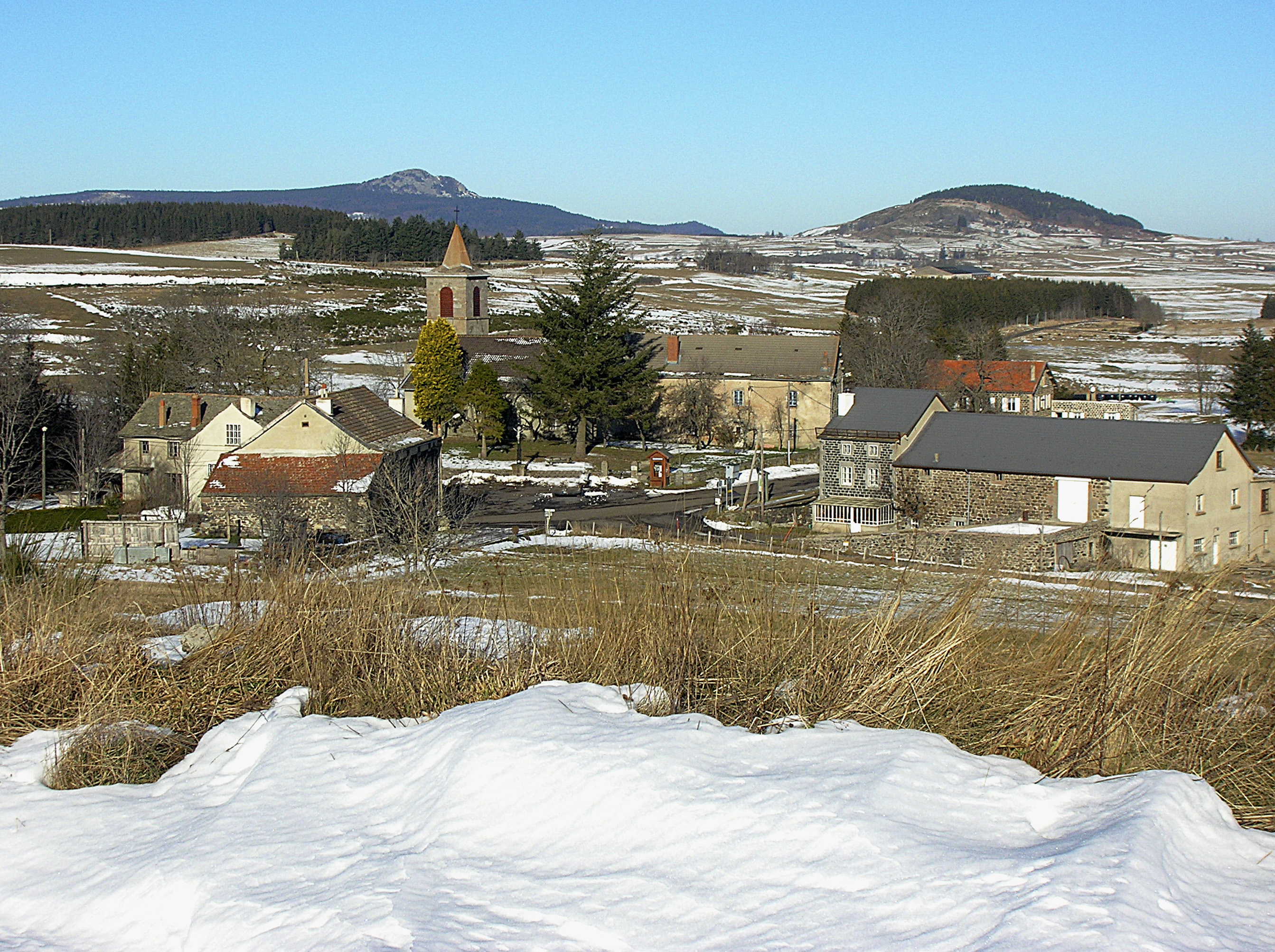 Les Vastres